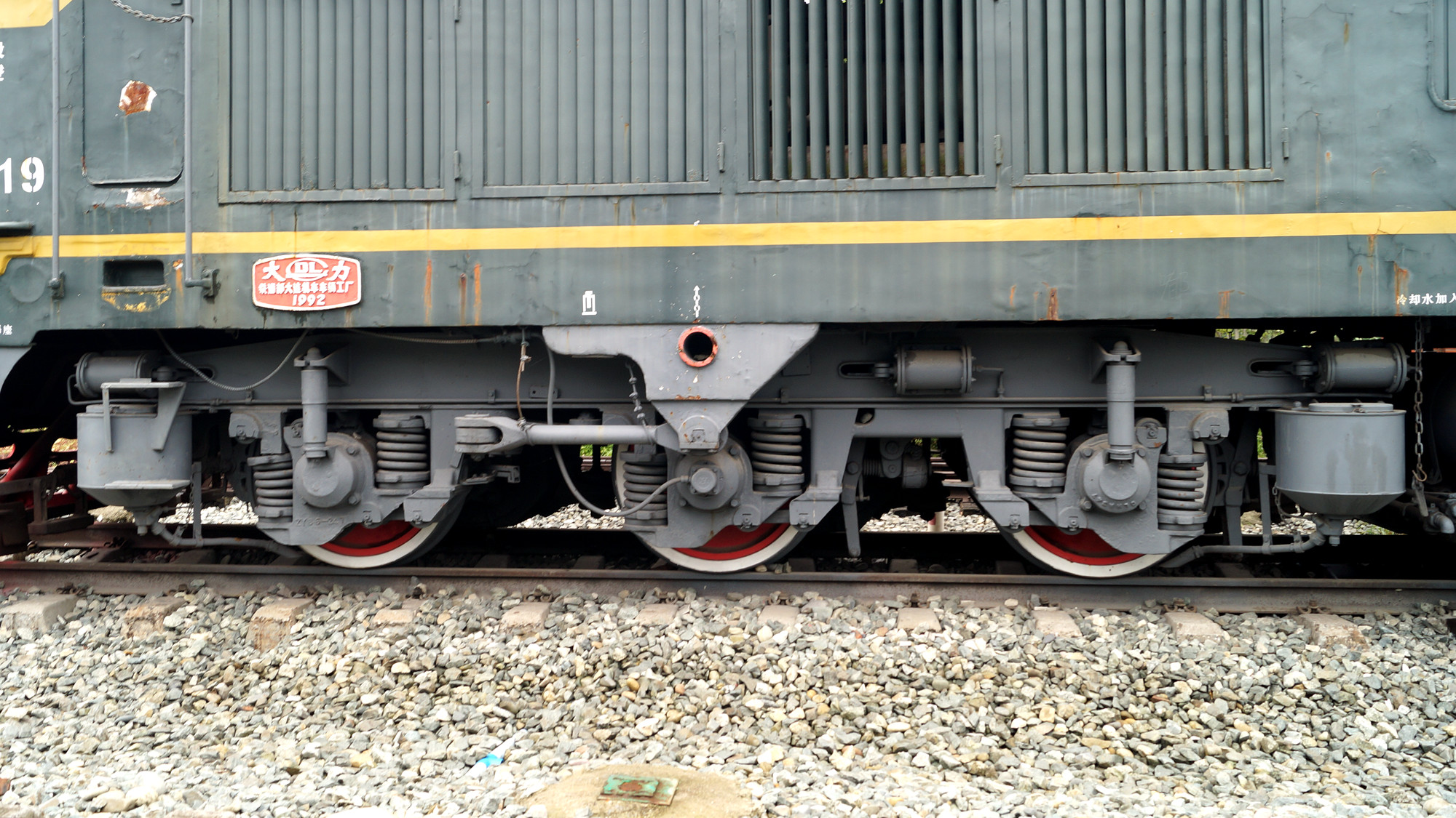 The bogie of China Railways DF4B 7019 diesel locomotive